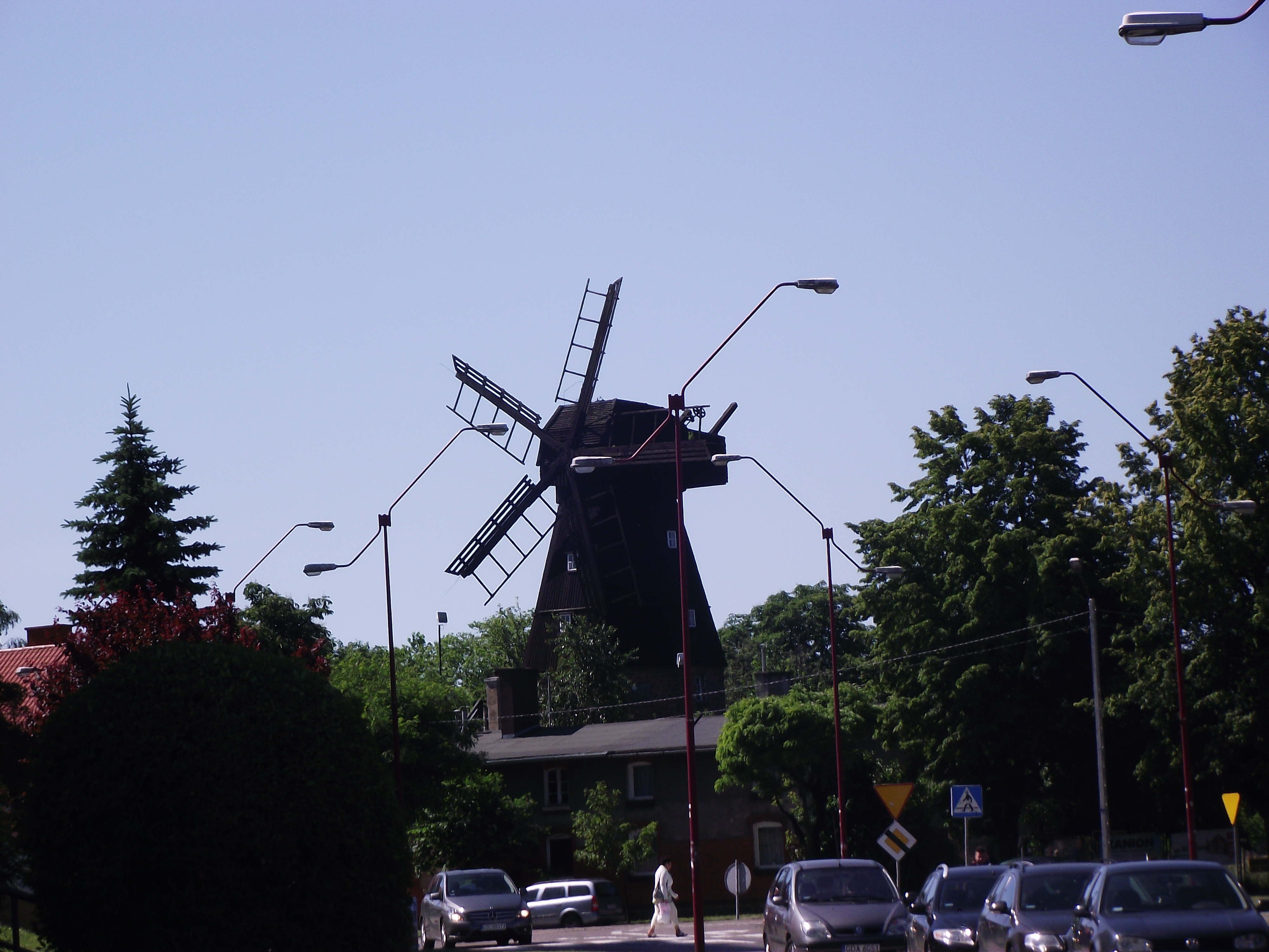 Tczew - zabytkowy wiatrak